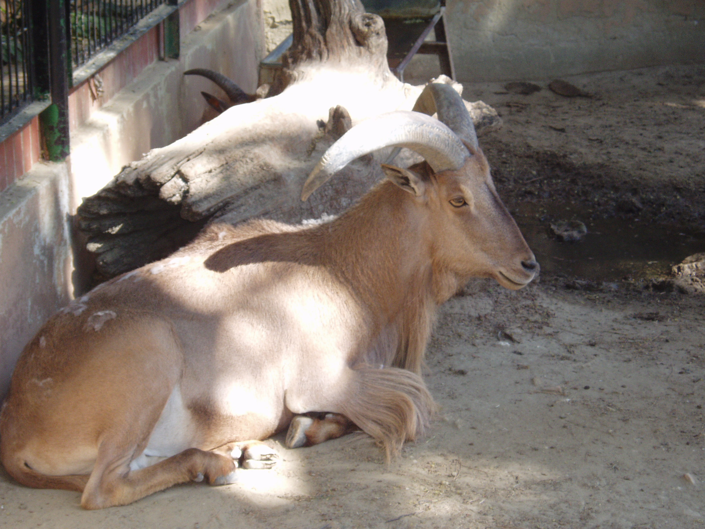 Arrui (Ammotragus lervia) en el Parque Zoológico y Jardín Botánico Alberto Durán de Jerez de la Frontera.